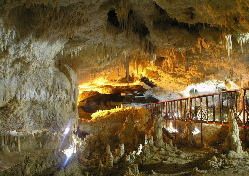 Katakhor cave in Zanjan